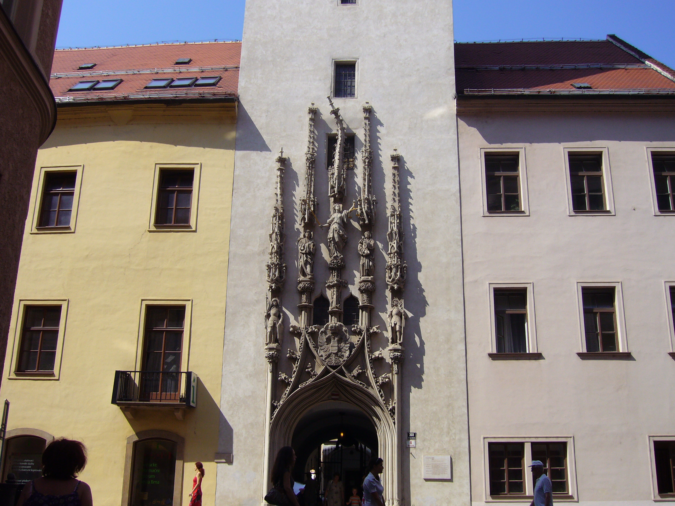 Portál Staré radnice v Brně od A. Pilgrama z roku 1510-1511